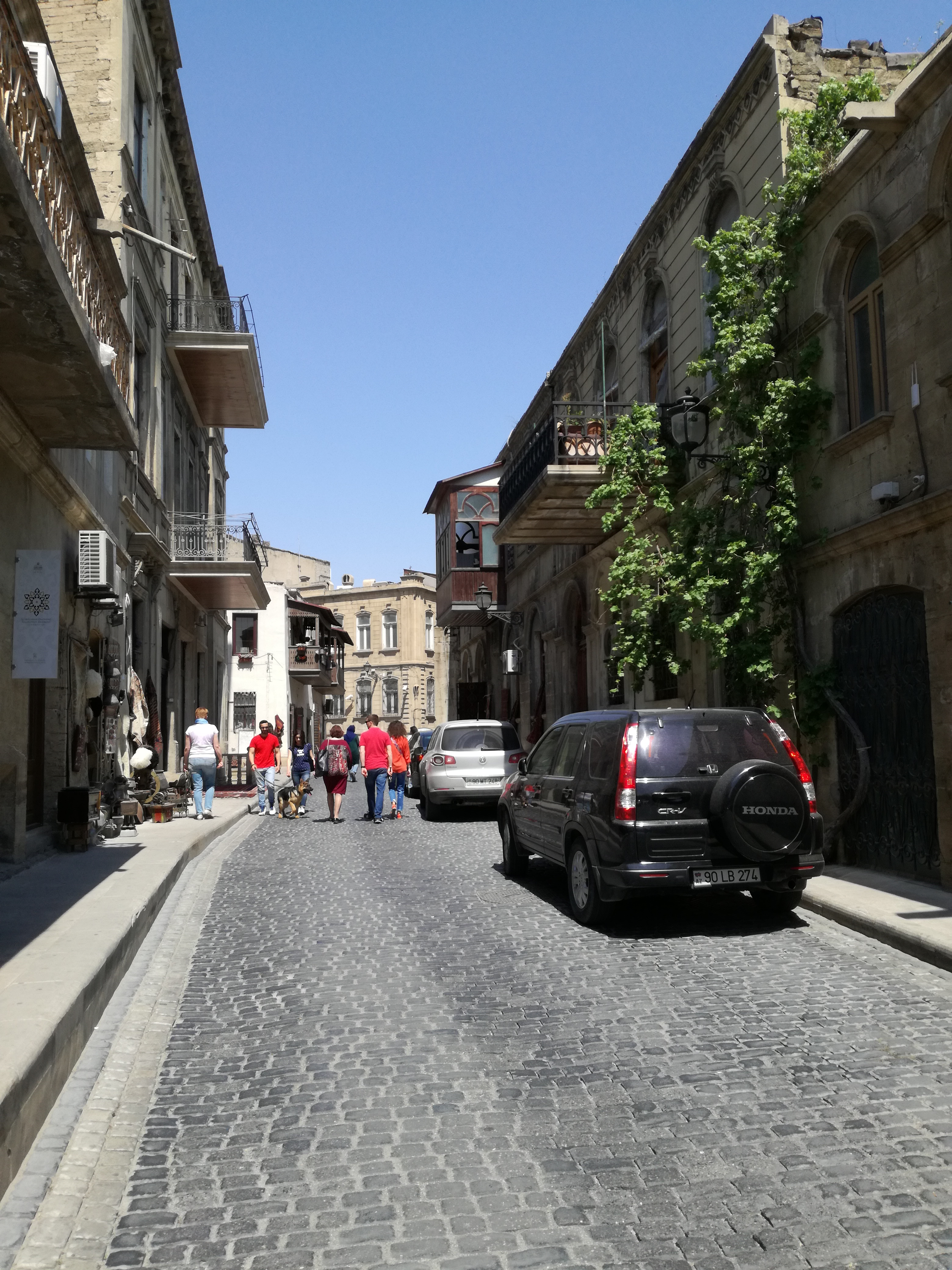 Ичери-шехер